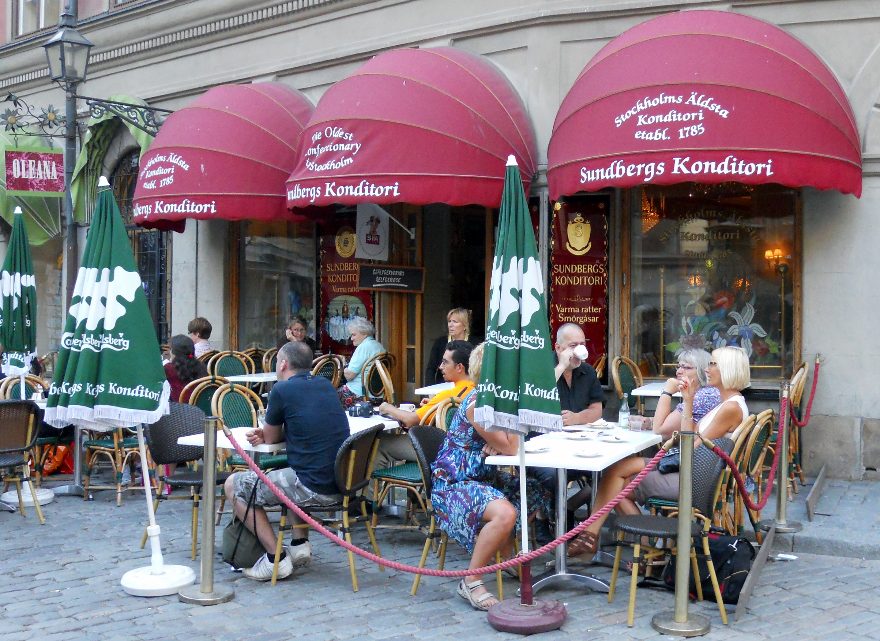 Sundbergs konditori vid Järntorget i Stockholm, grundat 1785.